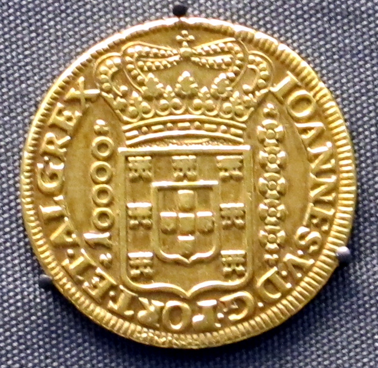 Minas geiras, moneta d'oro del brasile portoghese, xviii sec